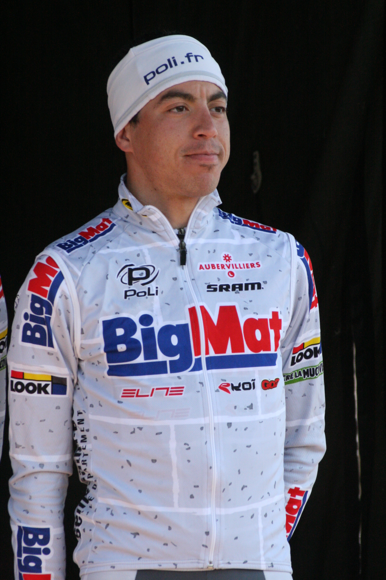 Nadir Haddou lors de la présentation des équipes des 4 jours de Dunkerque 2010